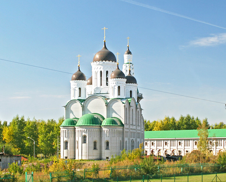 Храм Покрова Пресвятой Богородицы в Барнауле. 2015 год